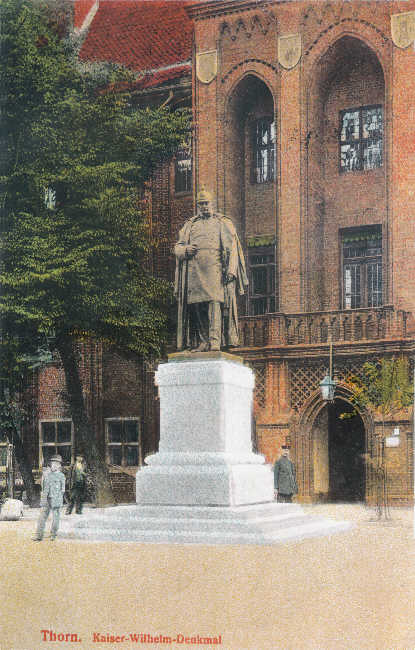 Pomnik cesarza Wilhelma I w Toruniu (1904-1919)